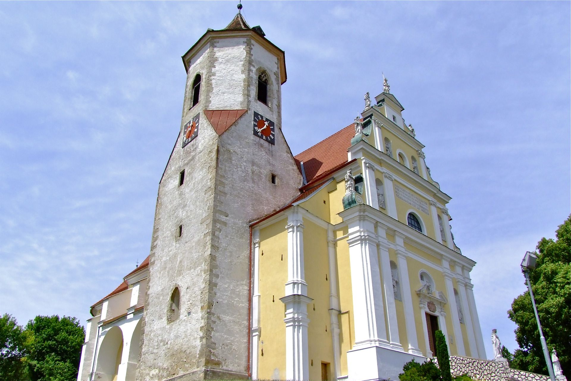 Kath. Pfarrkirche hl. Jakobus d. Ä.